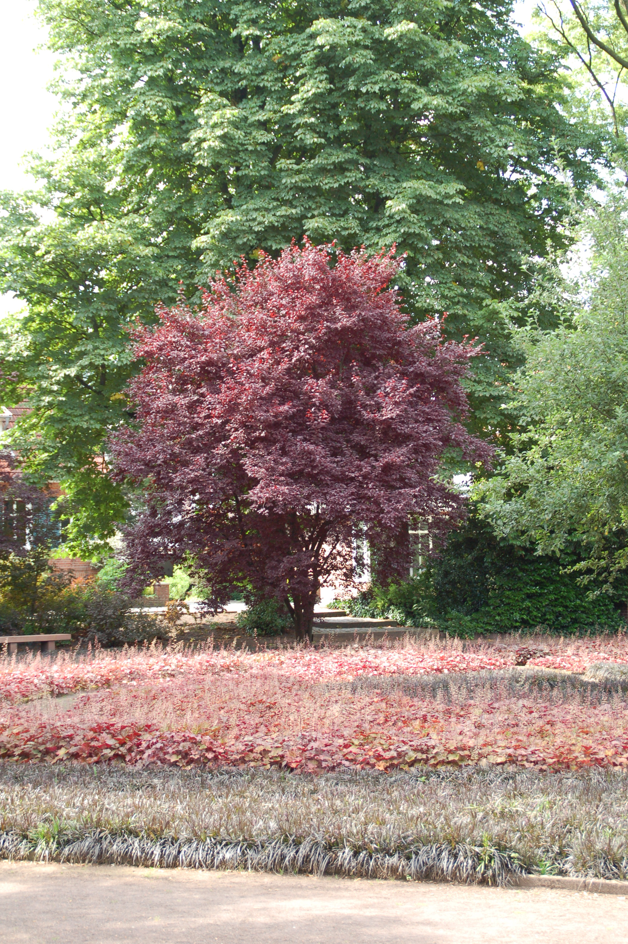 Schwarzer Garten in Nordhorn